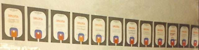 STK Zadrugar Diplome